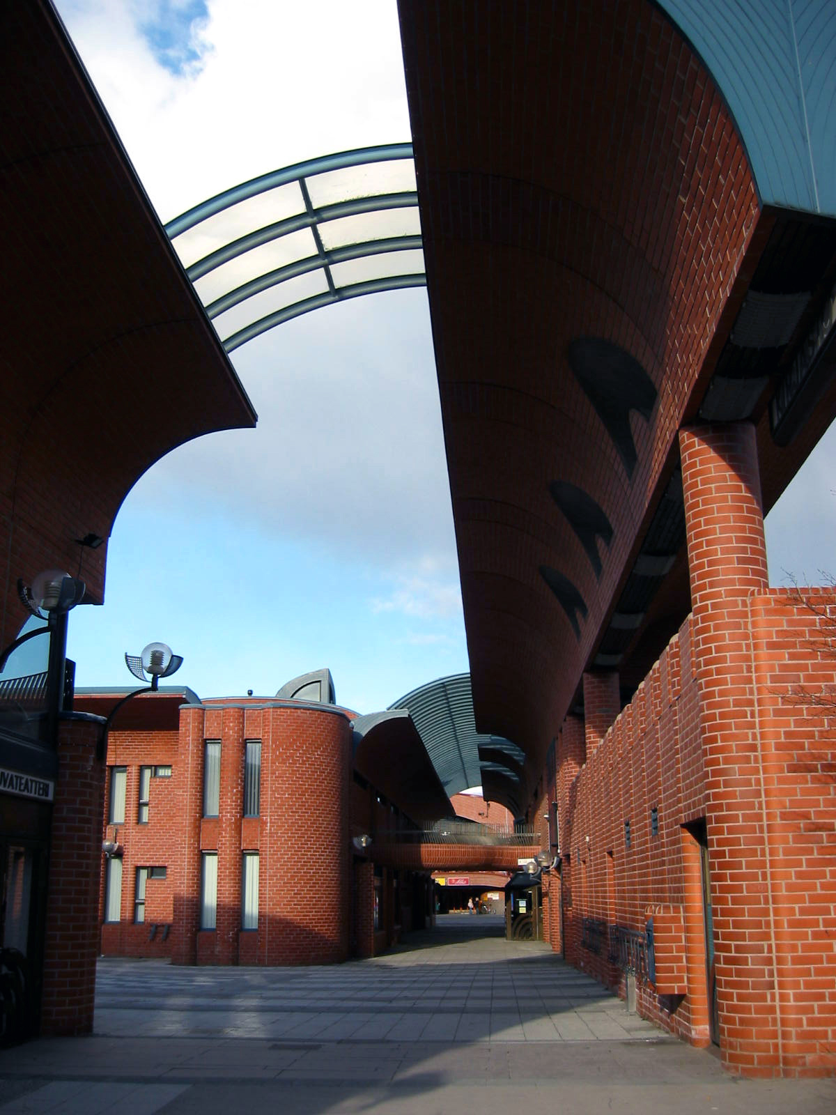 Hervanta_2.jpg